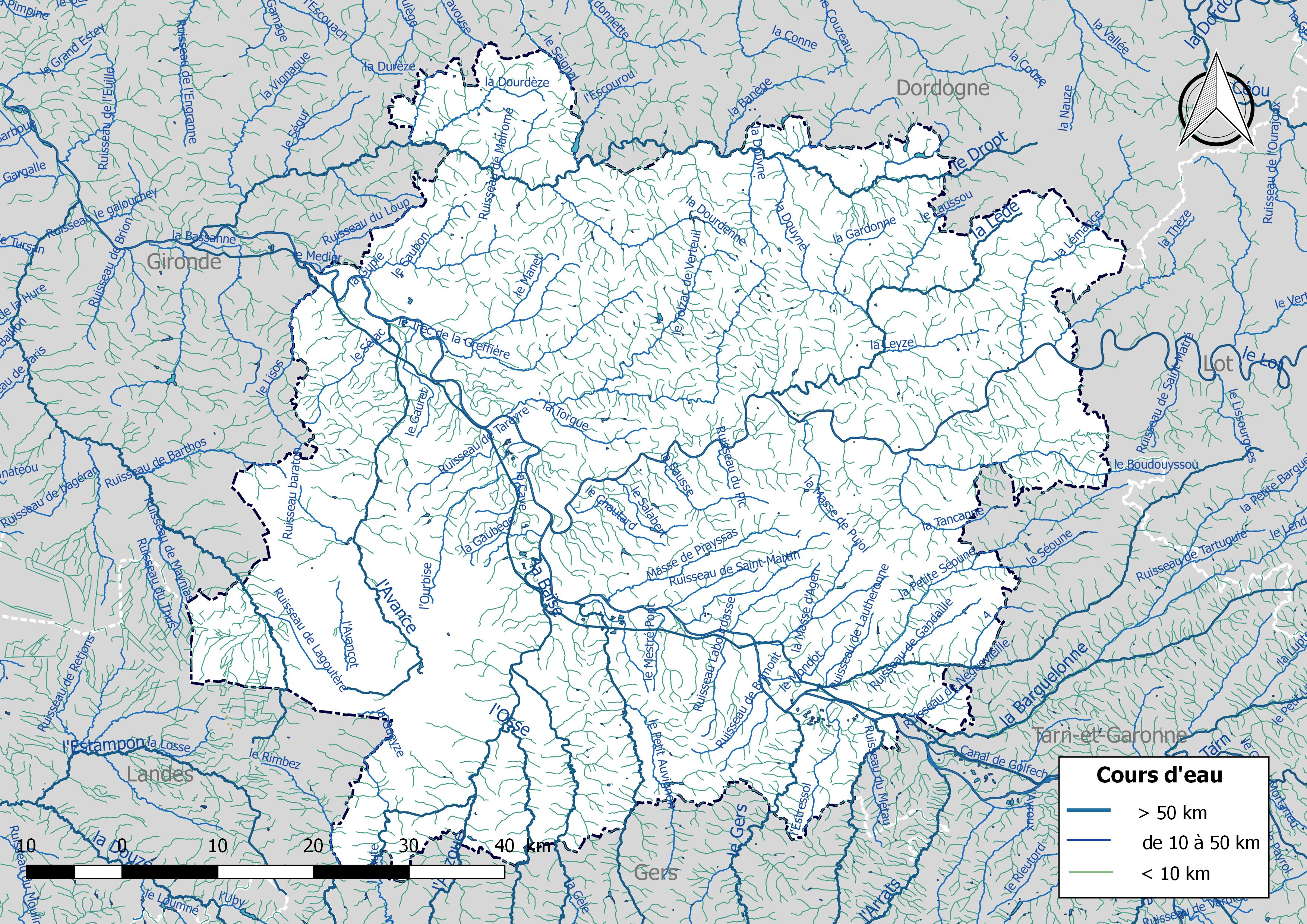 Réseau hydrographique du département de Lot-et-Garonne (France).